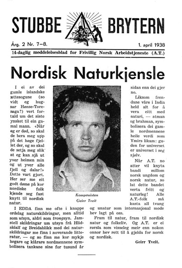 Geirr Tveitt engasjert i den frivillige arbeidstenesta før krigen